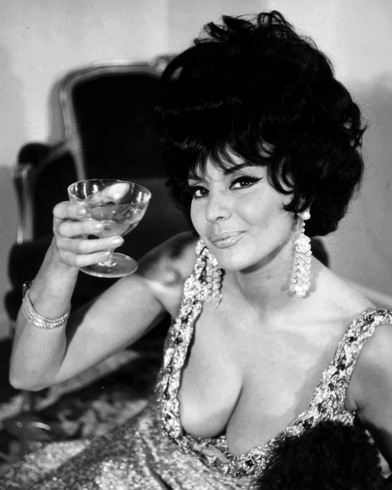 Isabel Sarli durante la filmación de Fuego, película de 1969.